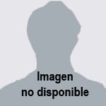 es una imagen para en la plantilla:infobox waterpolista poner algo cuando no tenga imagen del jugador.